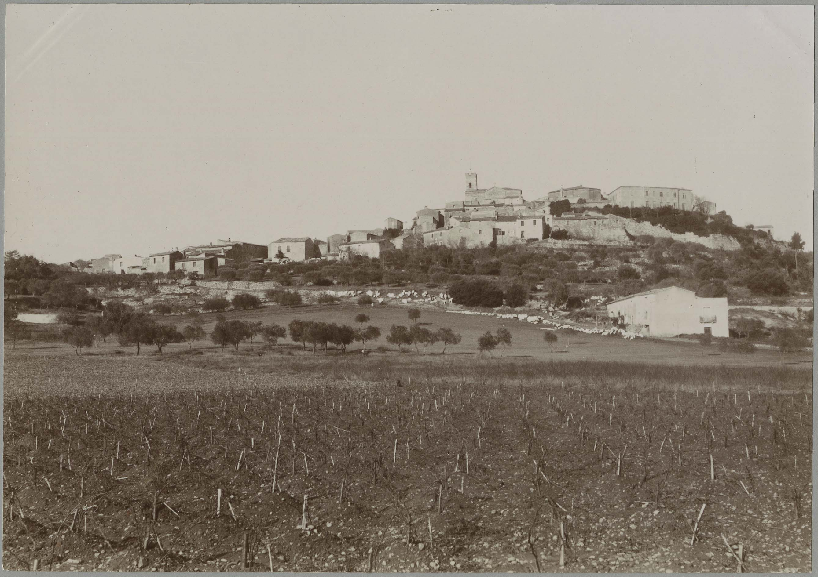 Montferrier. - Vue générale : photographie.